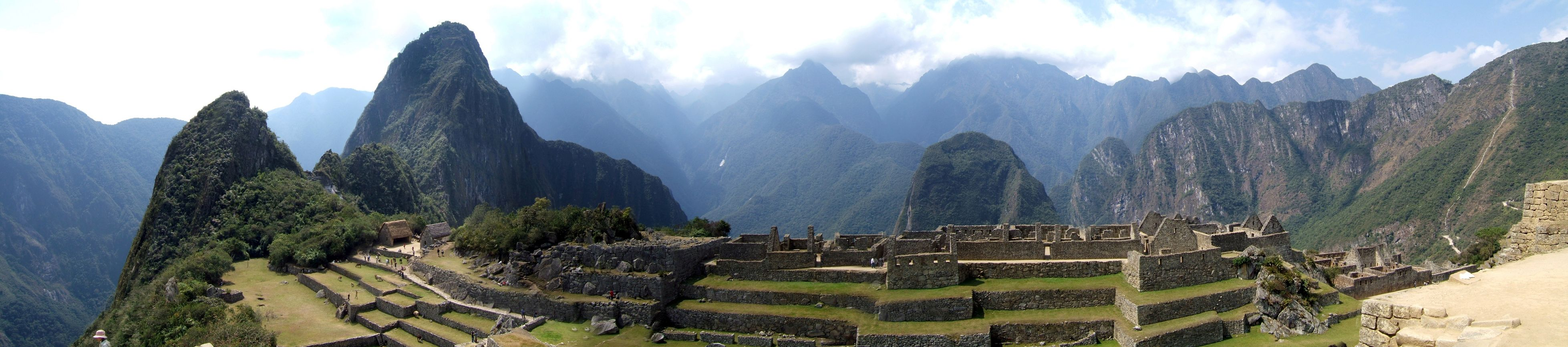 Maccu Picchu Panoramic